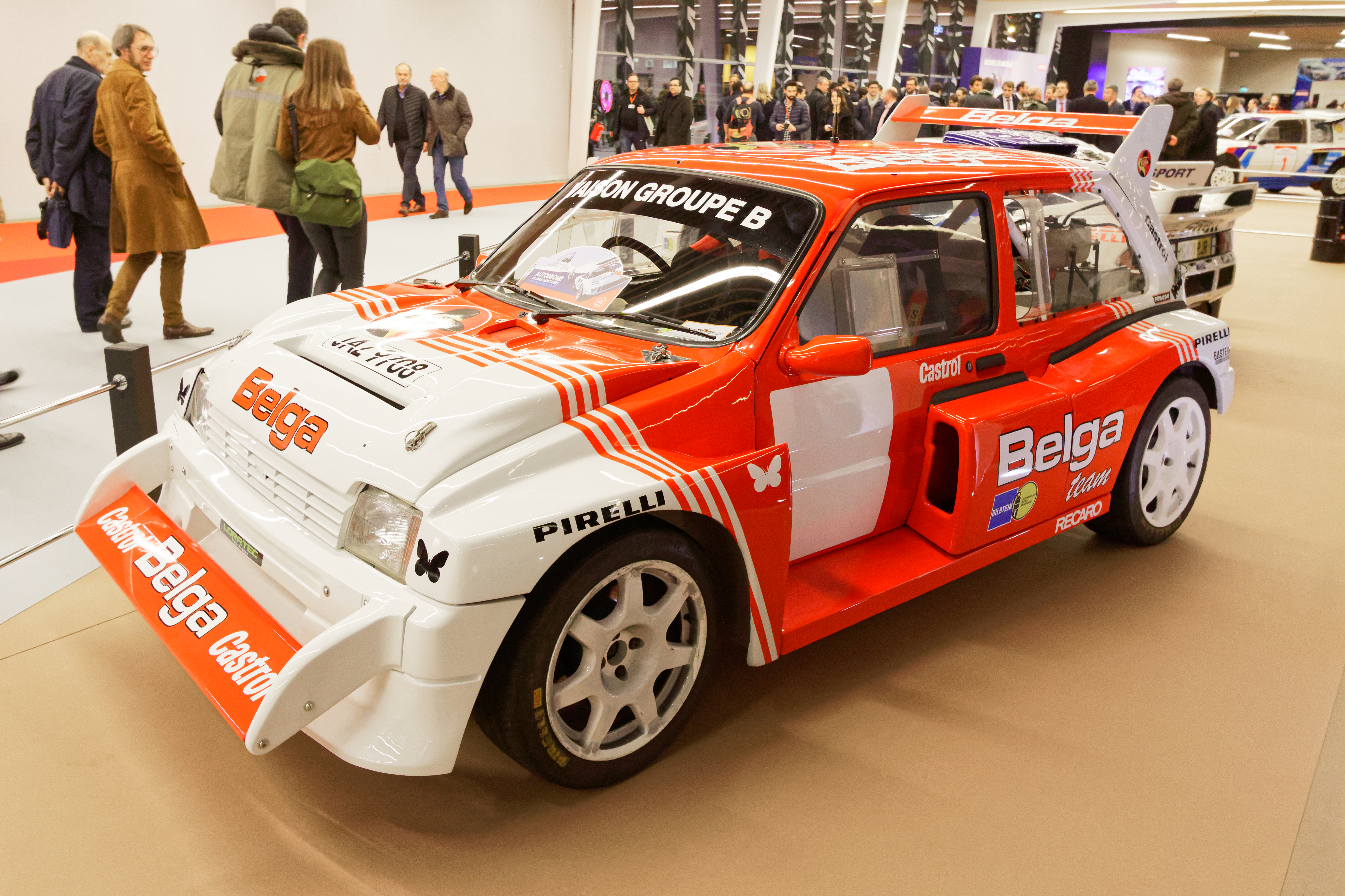 Une Austin Metro 6R4 de 1984 exposée lors du salon Rétromobile 2017.